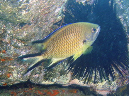 Chromis chromis mit Farbdimorphismus